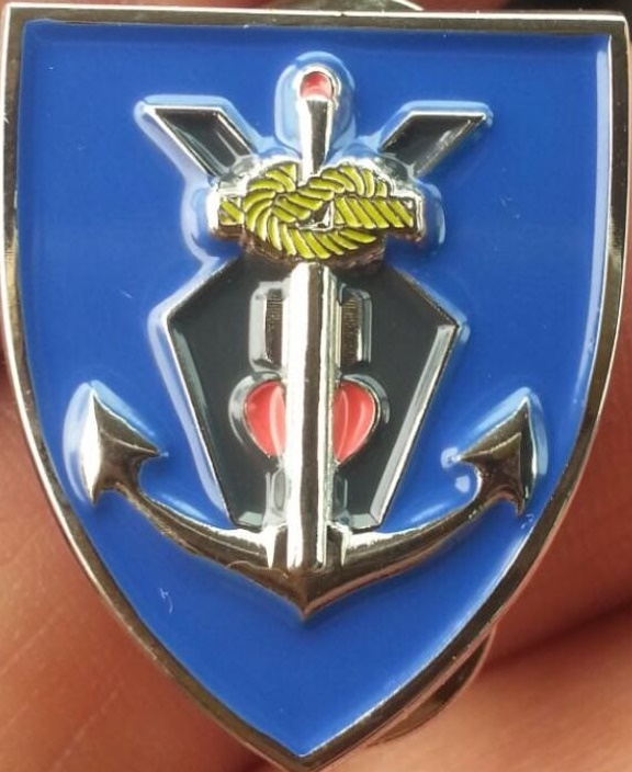 סמלון חזה ללוחמי שייטת ספינות הטילים 2018